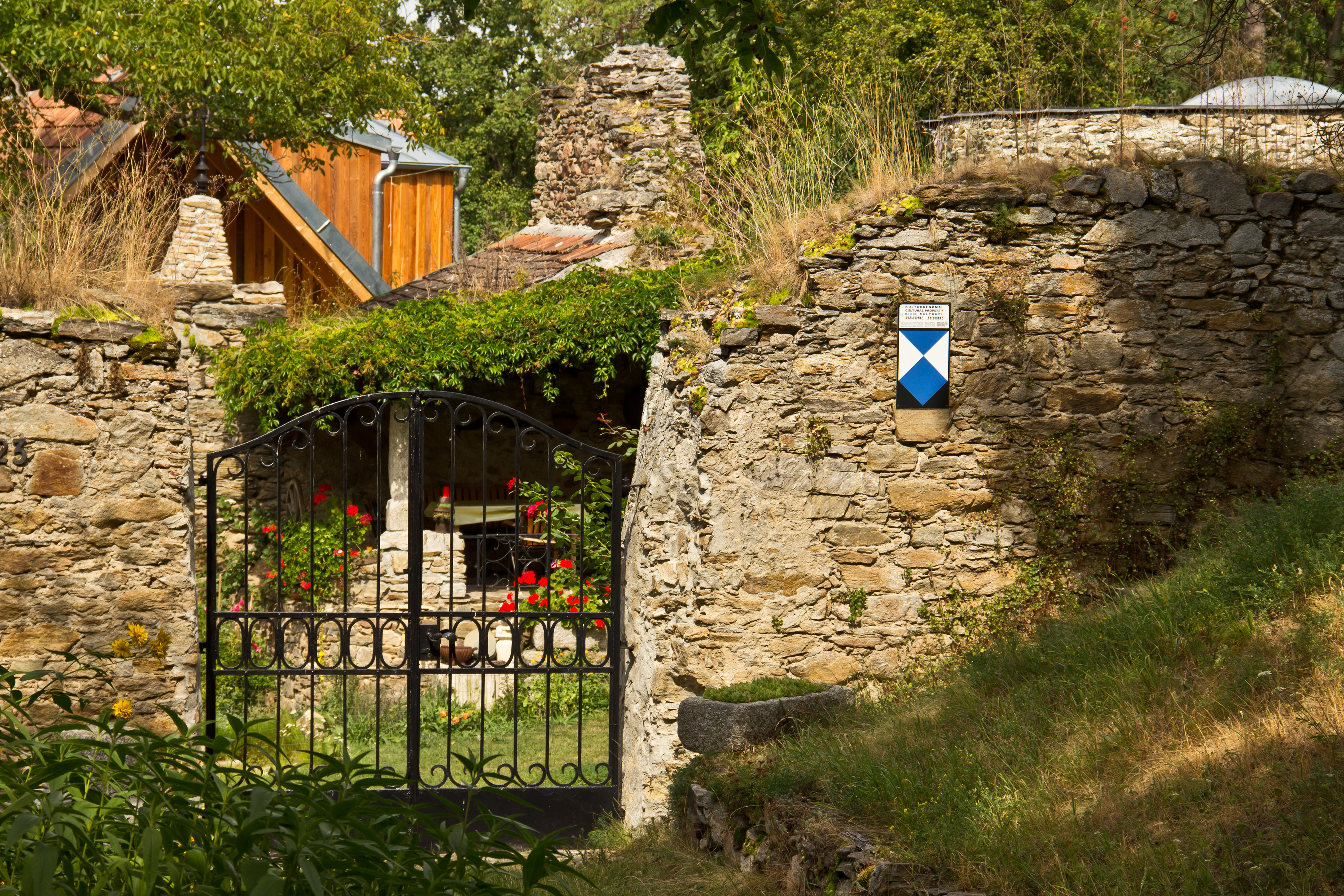 Die Burgrunine Mahrersdorf liegt nördlich des Ortes auf einem Hügel über der kleinen Taffa. Die Burg war 1276–1409 im Besitz der Marichatsdorfer und ging später an die Dachsner über.